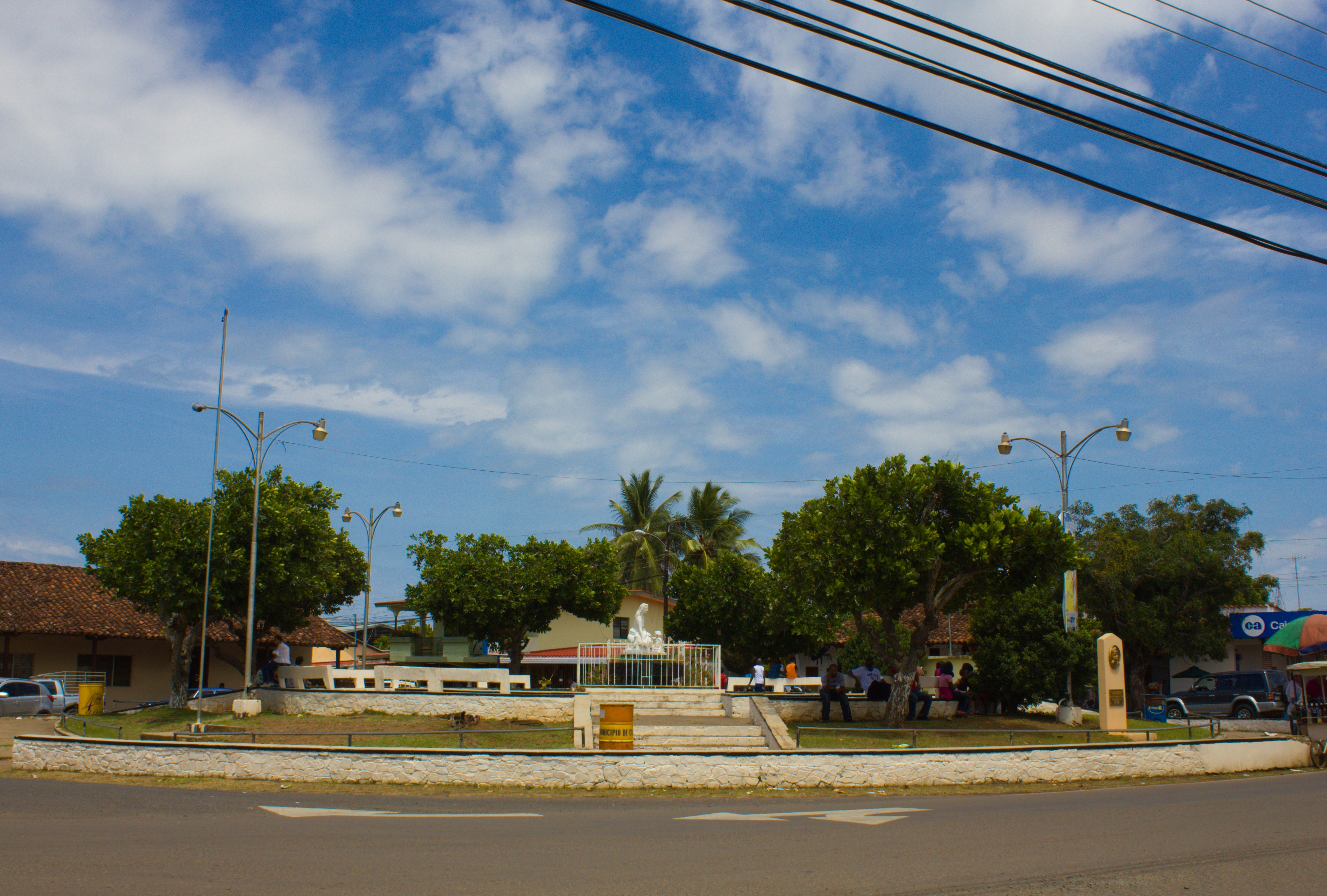 Parque de Monagrillo, Provincia de Herrera, Panamá.